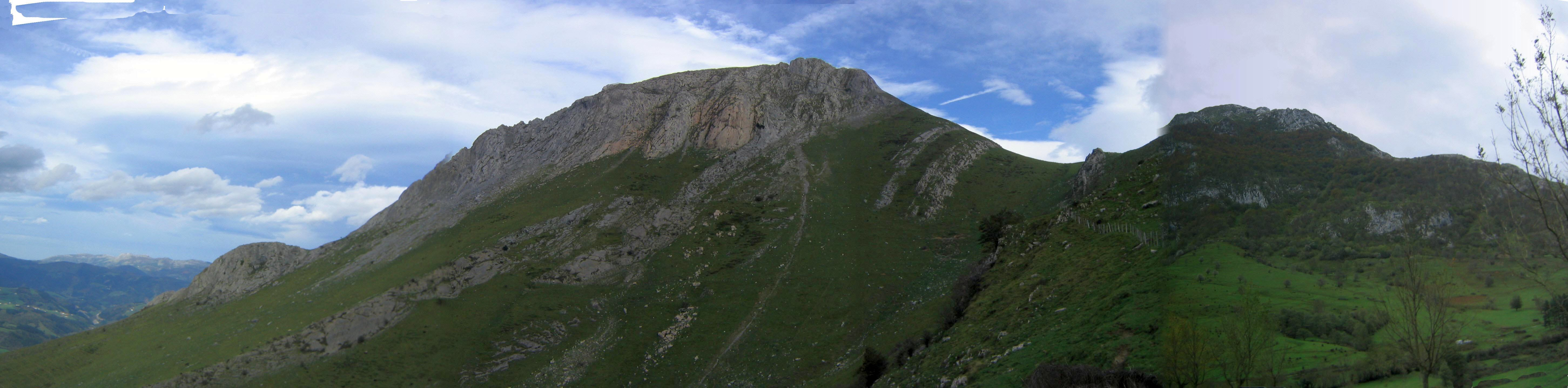 Vista general de Txindoki y su arista, Guipúzcoa, País Vaco, España.